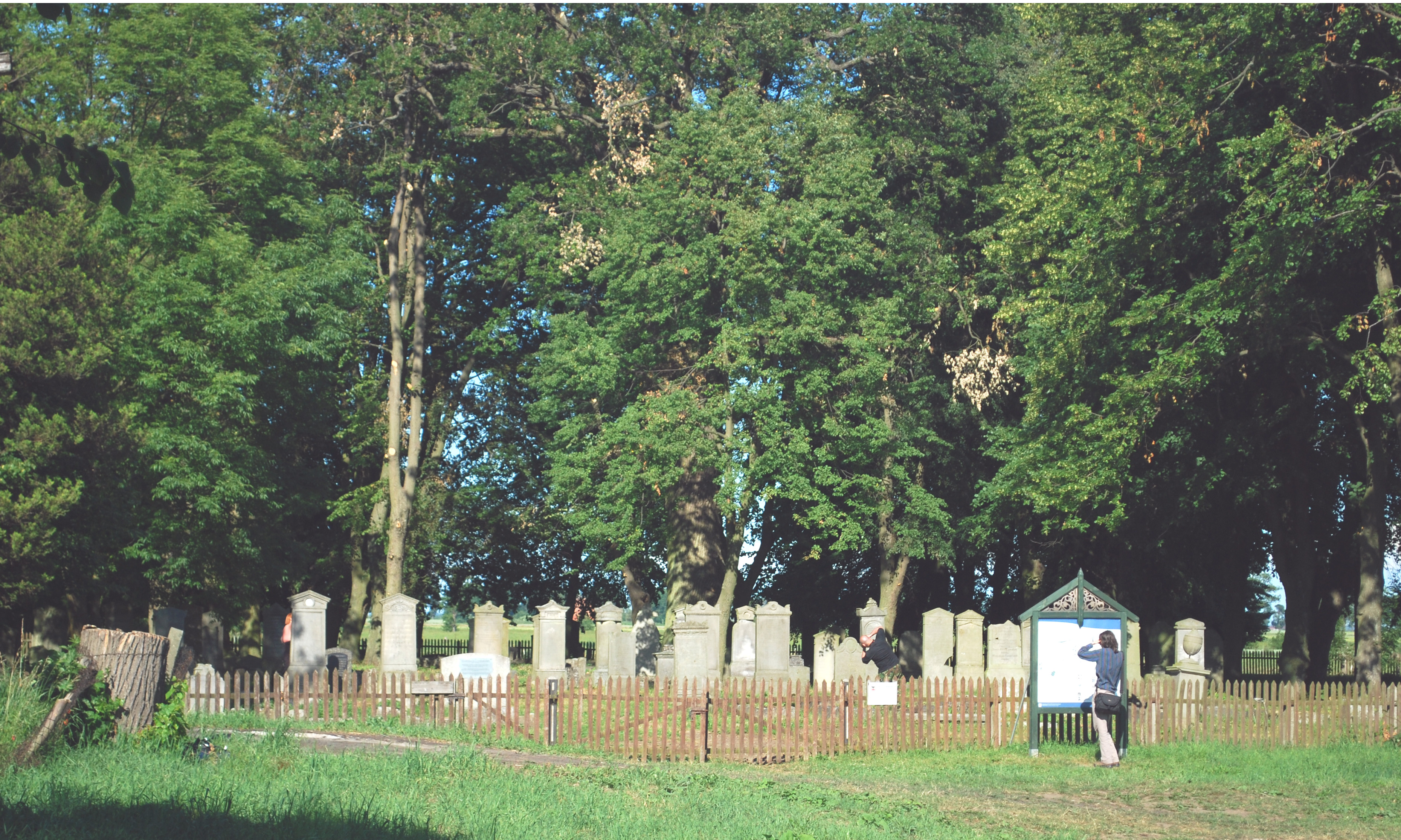 This photo of Kashubia, Pomerelia and Żuławy Wiślane was taken during Wikiekspedycja 2010 set up by Wikimedia Polska Association. You can see all photographs in category Wikiekspedycja 2010. The making of this document was supported by Wikimedia Polska. Cmentarz mennonicki w Stogach.